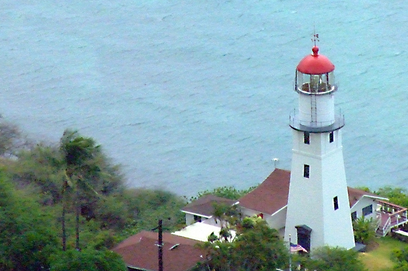 Phare de Diamond Head, Hawaii; Amérique